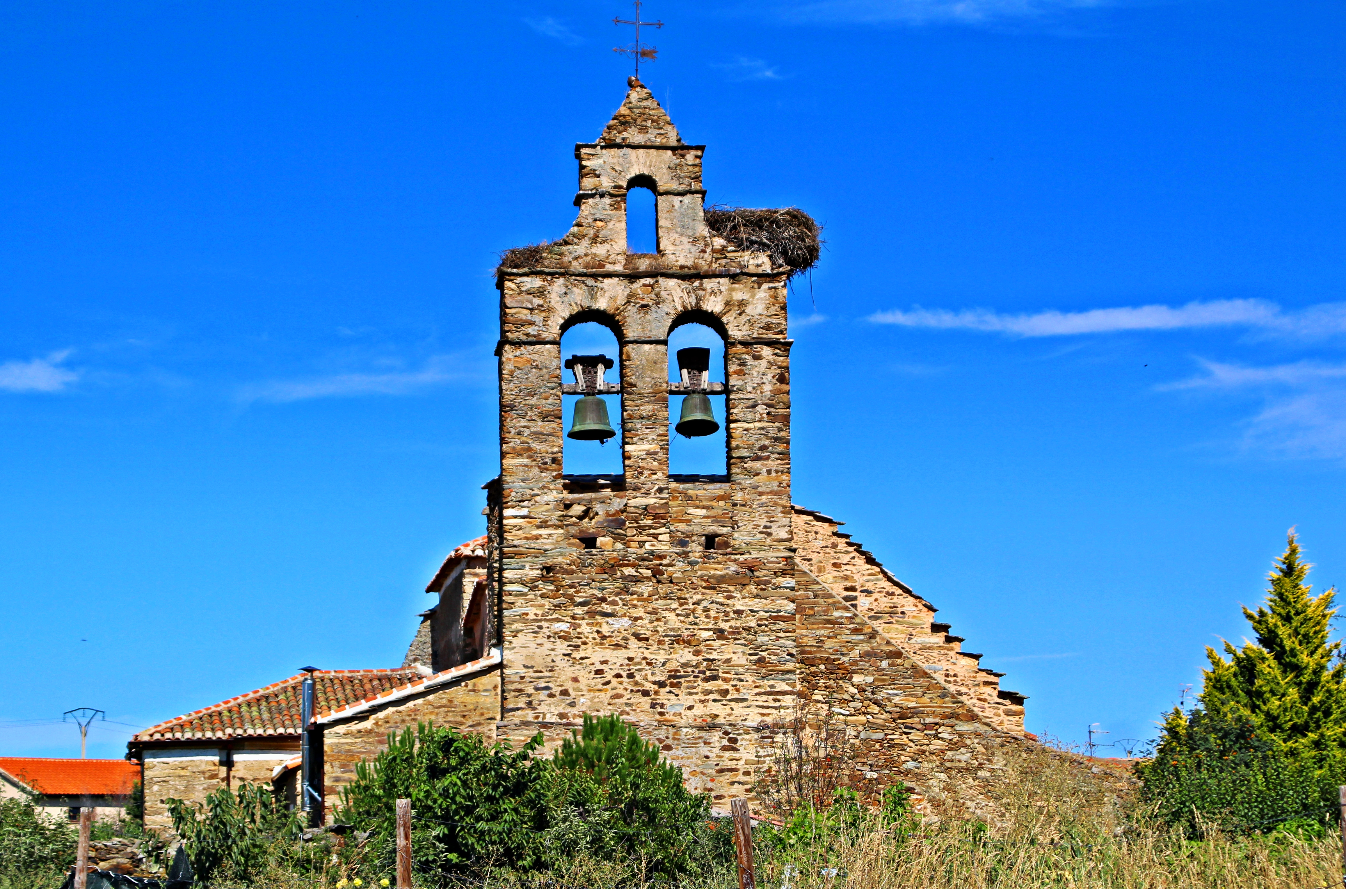 Luyego, La Maragatería en la provincia de León.